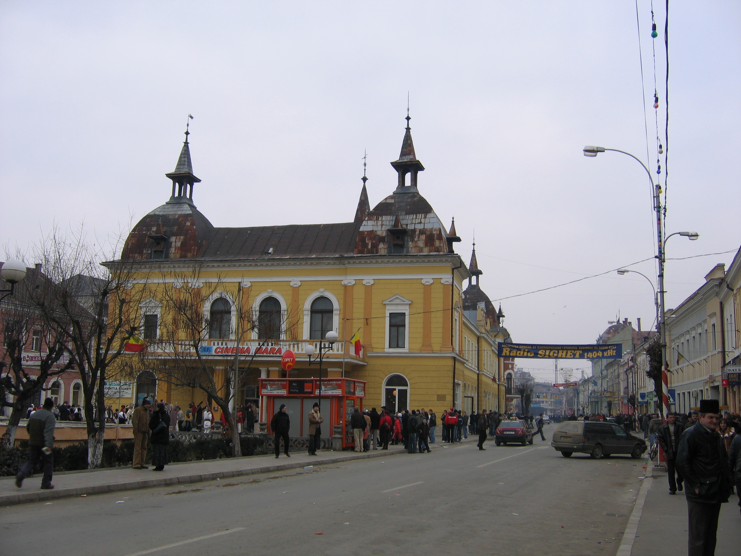 Hauptstrasse im Zentrum von Sighet